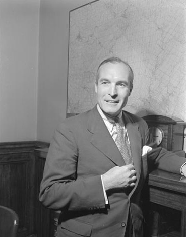 Dana Porter standing against a mantle